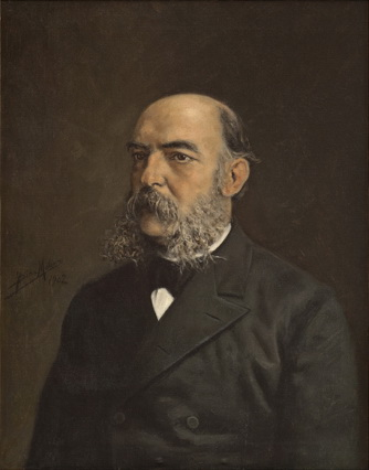 José Amador de los Ríos. Número de inventario: 1990-123-11.